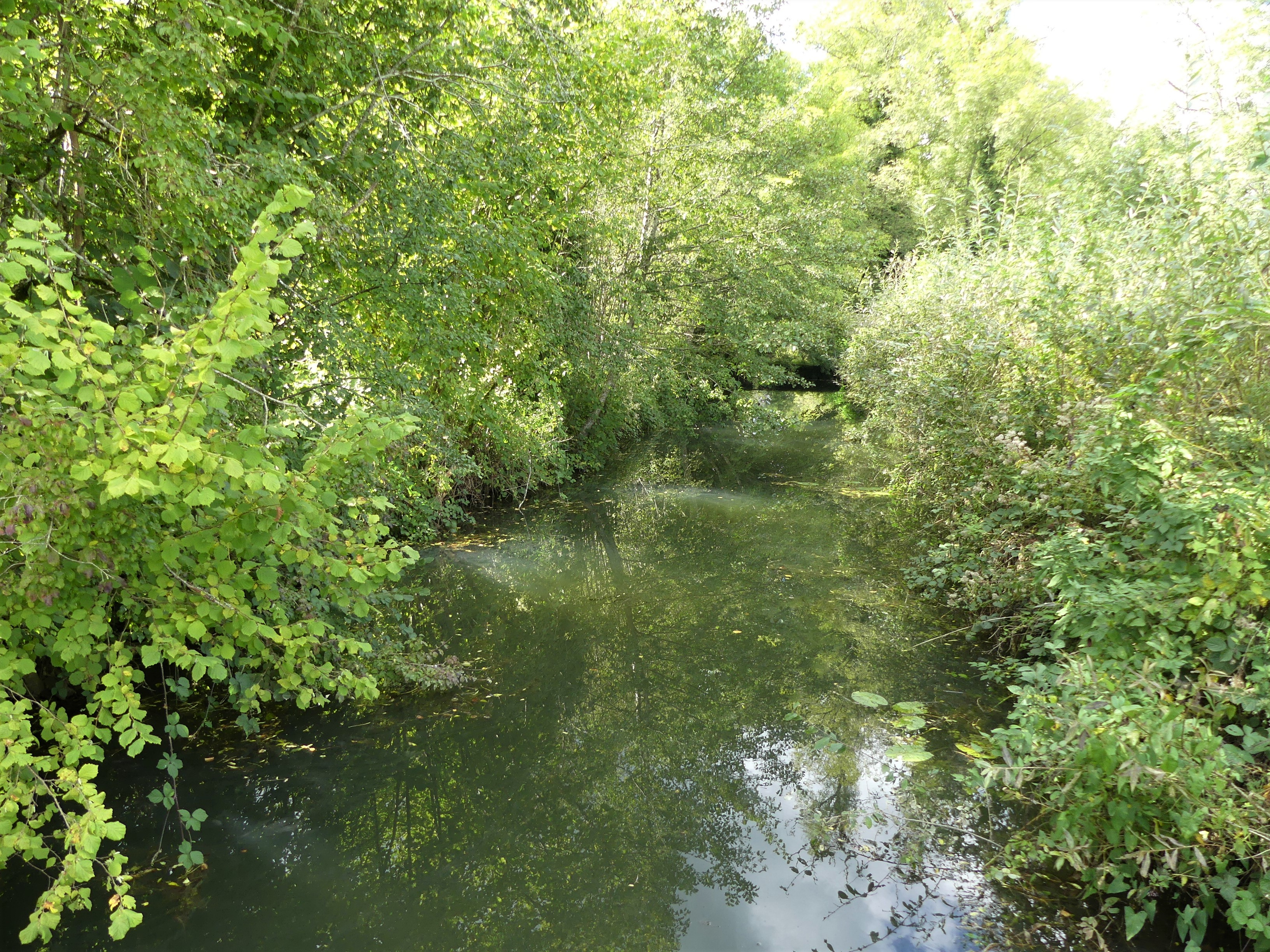 Au pont de Lavergne, la Nizonne marque la limite entre Rudeau-Ladosse (à gauche) et Mareuil en Périgord (ancienne commune de Saint-Sulpice-de-Mareuil) (à droite), Dordogne, France. Vue prise en direction de l'aval.